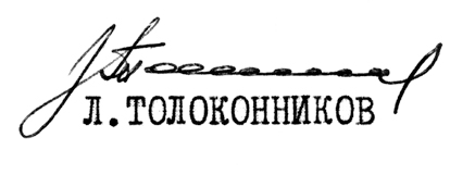 Фрагмент страницы 72 книги: Шубин, Павел. Программа «Аполлон» в секретных советских документах. / Автор-сост. Шубин П. С. Сборник материалов. Кемерово, издатель Шубин П. C., 2019. – 112 стр.: ил.